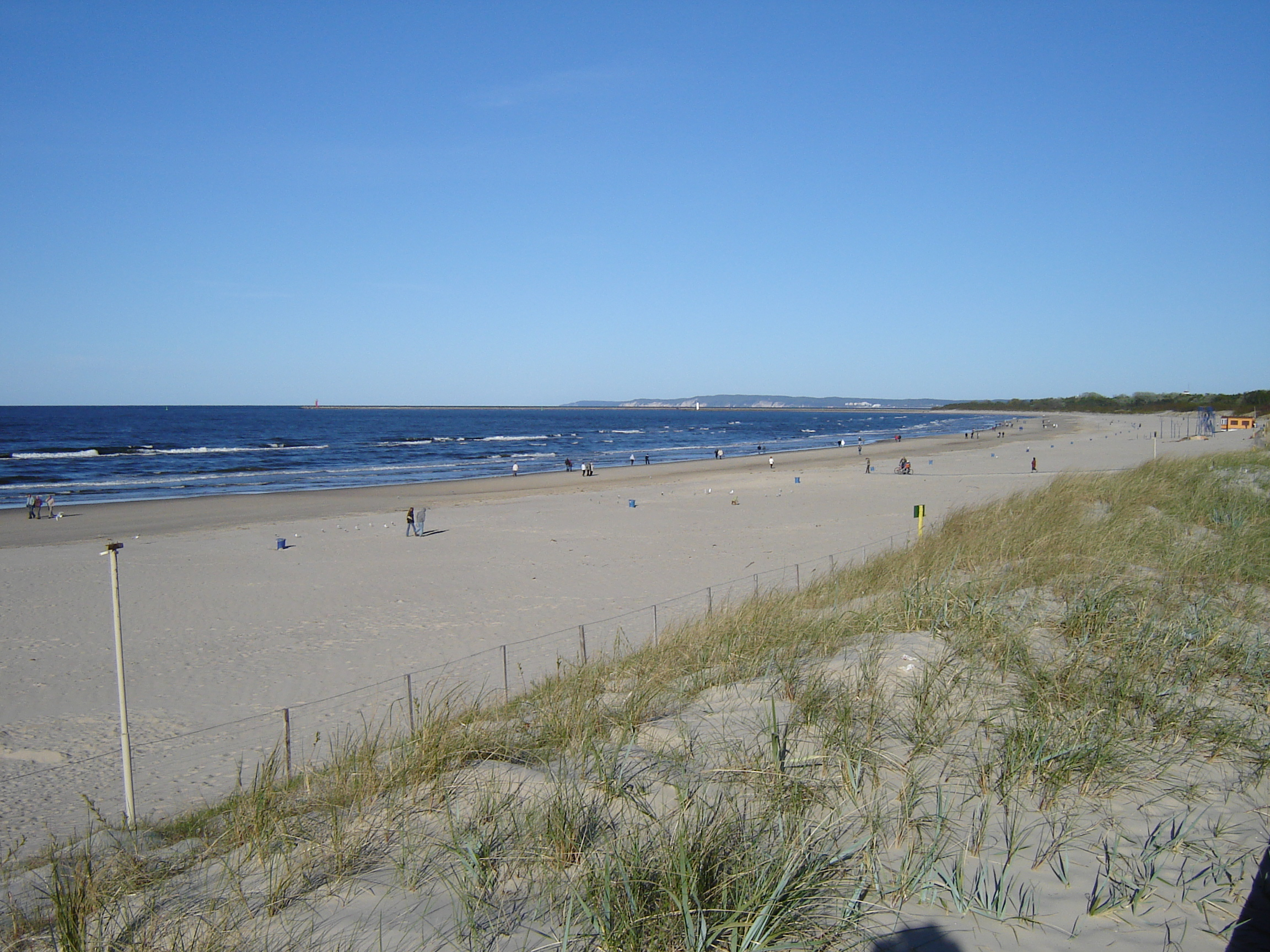 Największa i najszersza plaża w Polsce, plaża w Świnoujściu